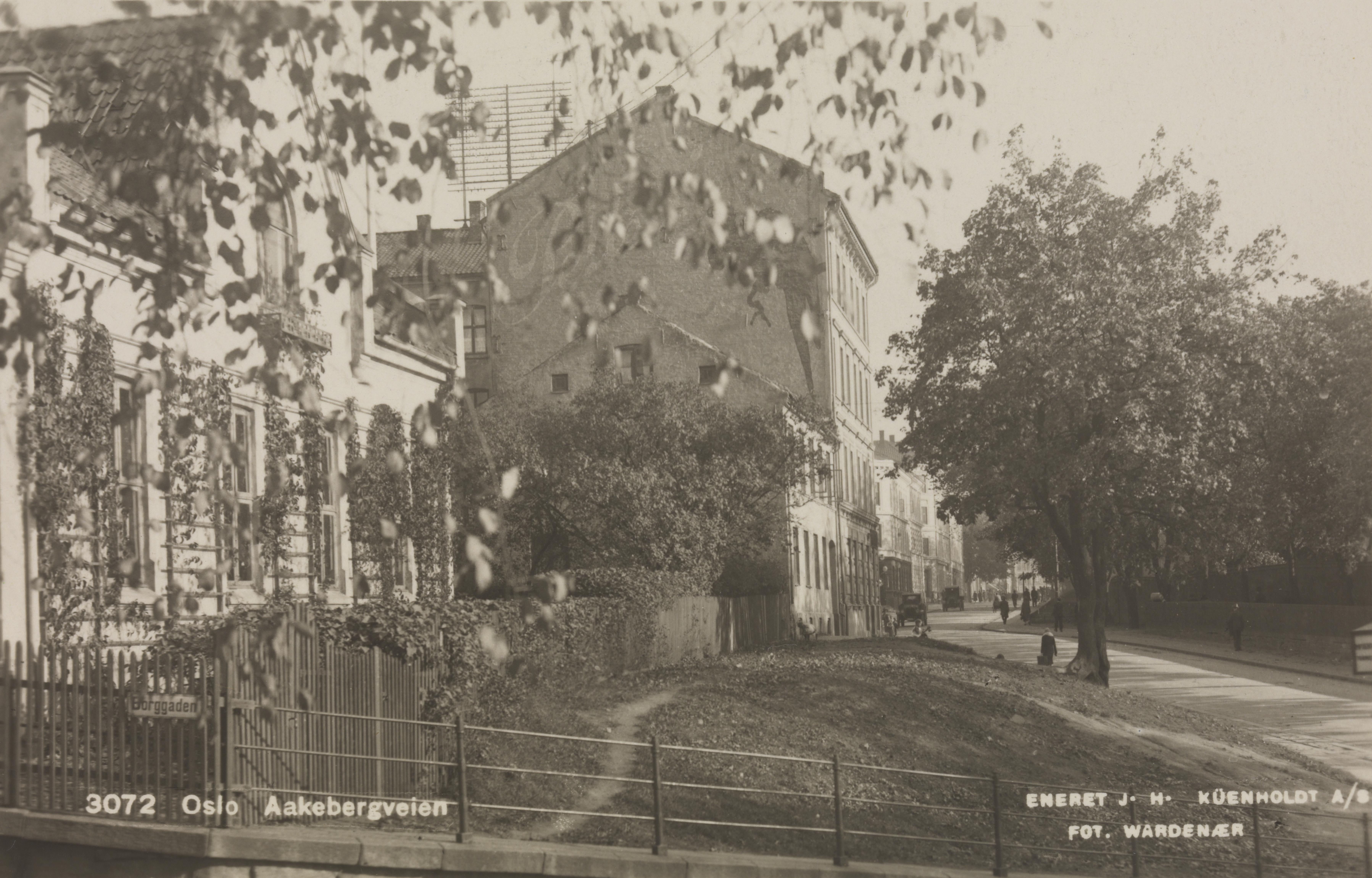 Bildet er hentet fra Nasjonalbibliotekets bildesamling